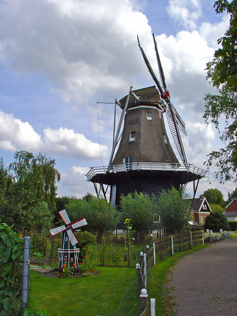 molen "de Leeuw" in Zeerijp